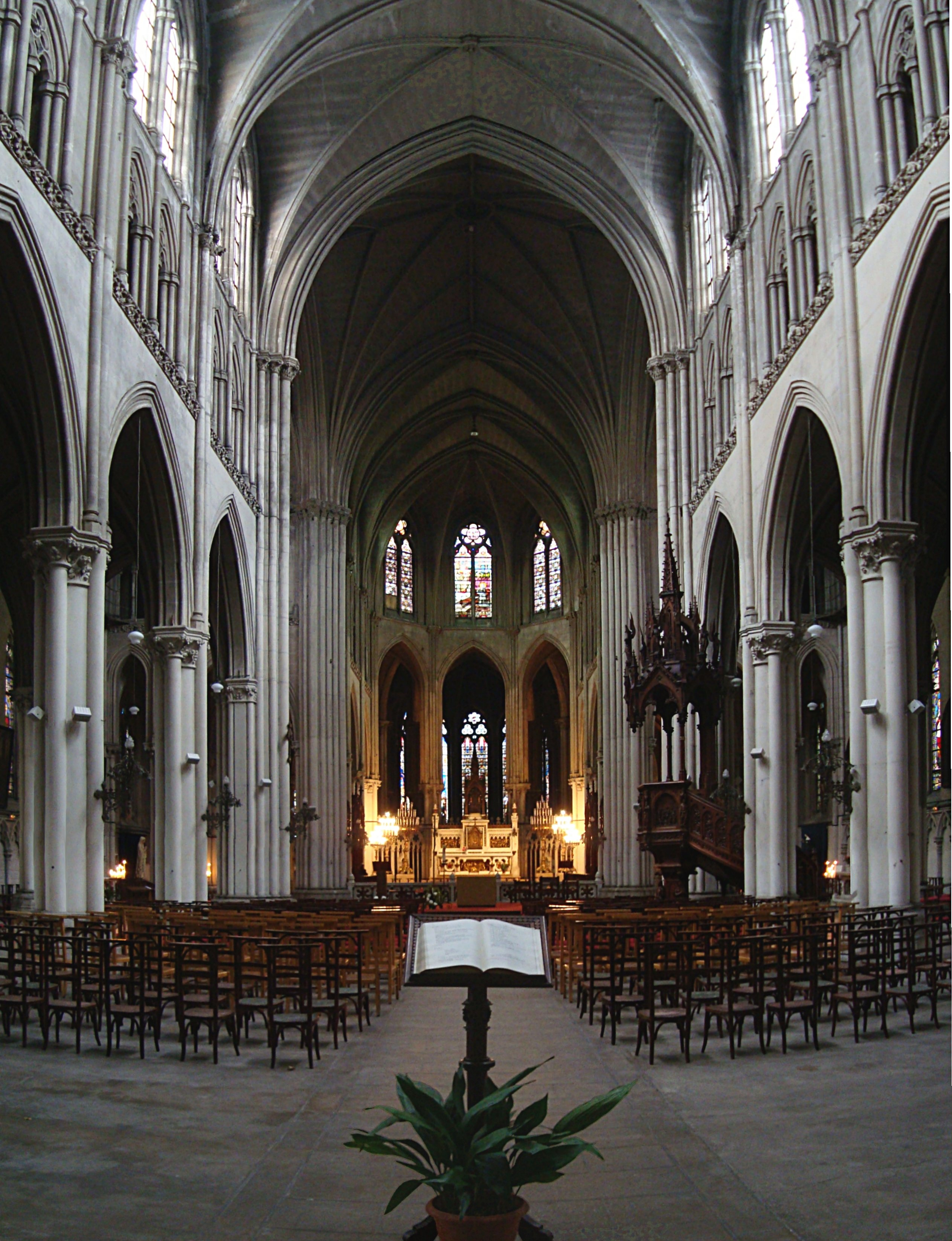 Vue de l'intérieur de l'église du Sacré-Coeur de Lille (Nord), construite entre 1875 et 1898.